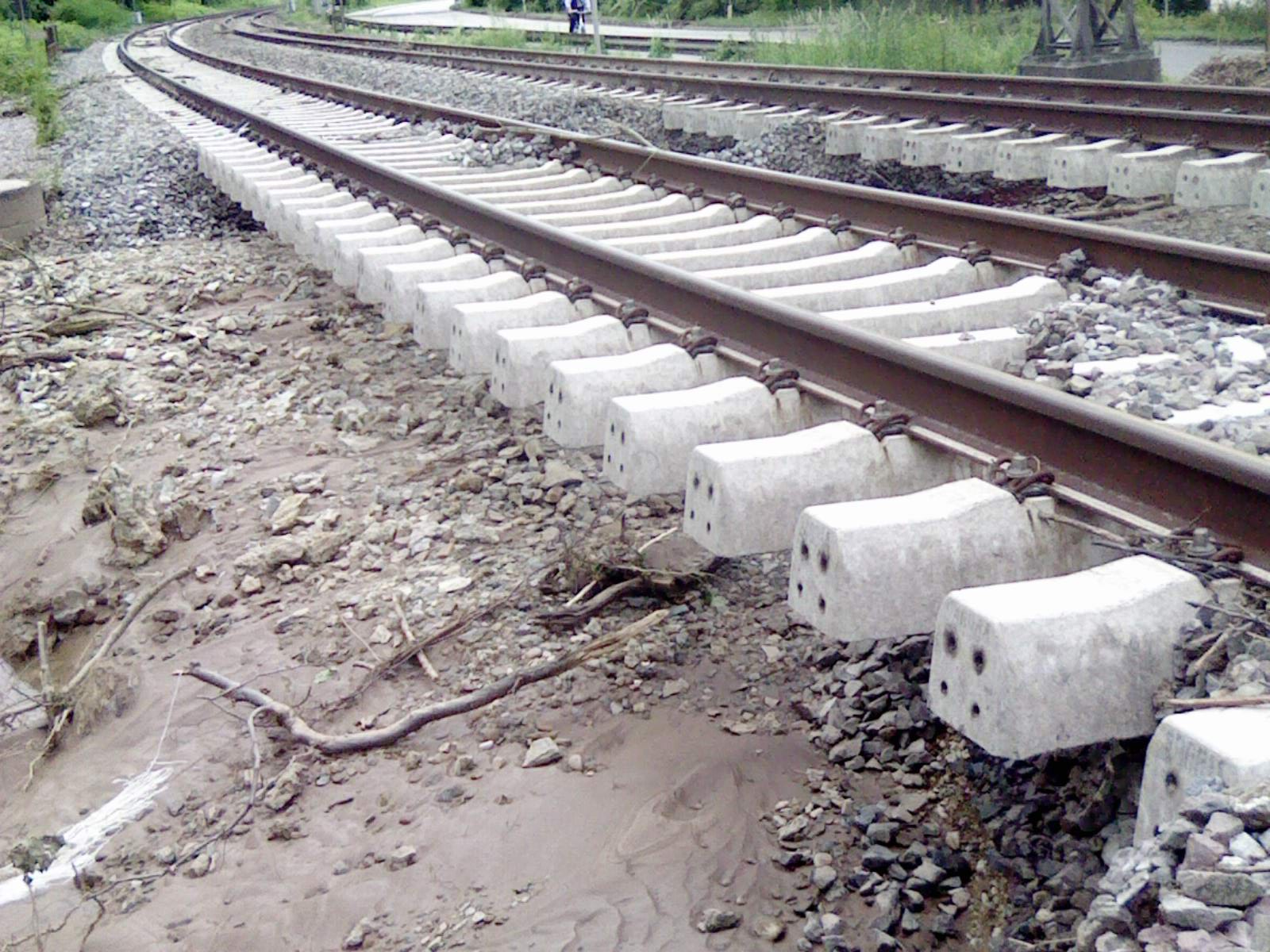 Nach dem außerordentlichen Starkregenereignis am 29. Mai 2016 („Elvira“) wurde durch die enorme Wasserführung des sonst kleinen Amorbaches bei beiden Gleisen der Bahnlinie zwischen Neckarsulm und Bad Friedrichshall das Schotterbett an mehreren Stellen unterspült. Das Material wurde quer über die K2000 ("Alte B27", "NSU-Straße") auf das Werksgelände von AUDI gespült.